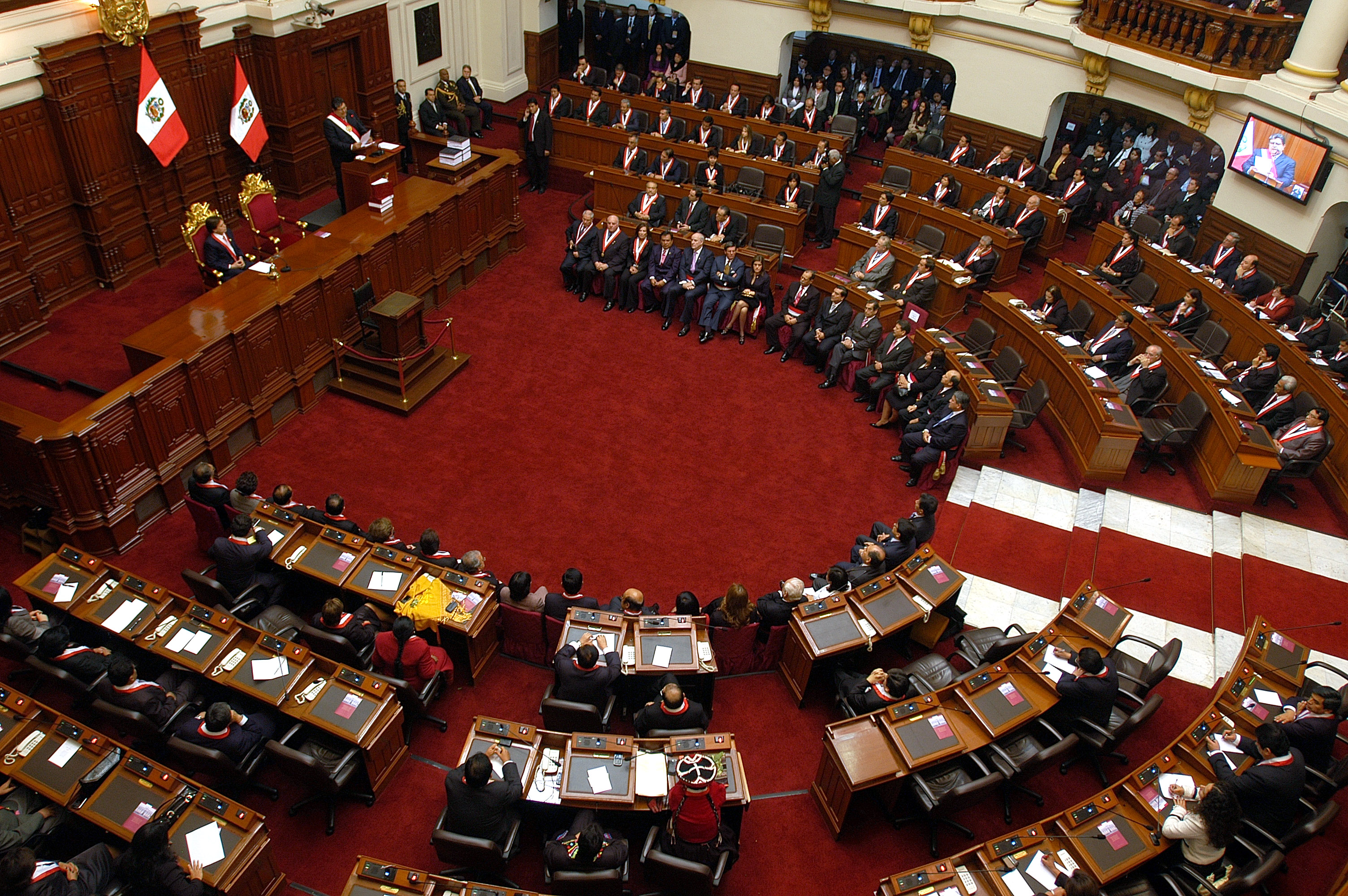 Vista panorámica de la Sesión Solemne realizada hoy por el Congreso de la República, en la cual el jefe del Estado dirigió su Mensaje a la Nación en ocasión de celebrarse el 189° Aniversario de la Independencia Nacional.